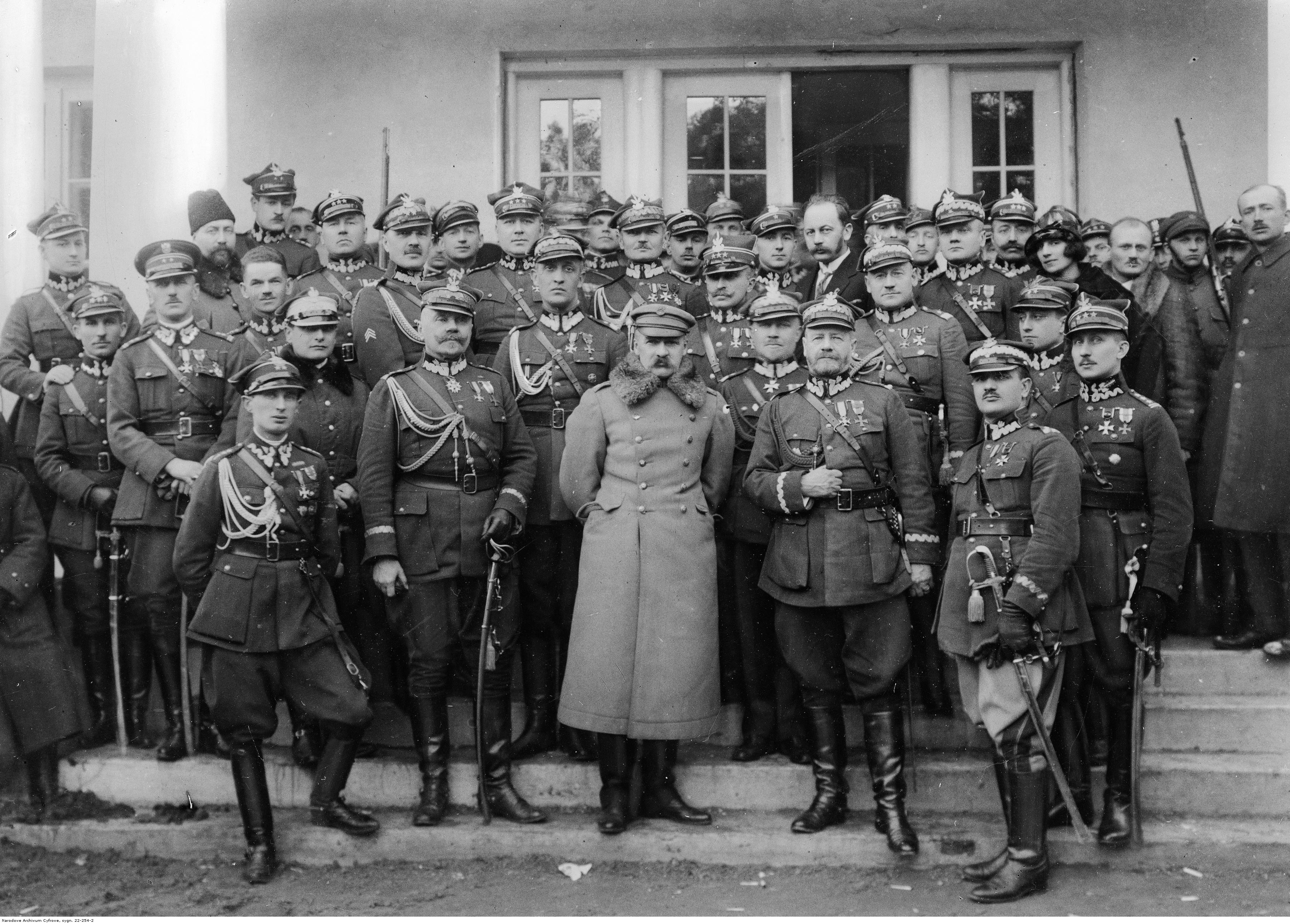 Marszałek Józef Piłsudski w towarzystwie generałów Wojska Polskiego - fotografia grupowa. Stoją na pierwszym planie od lewej: por. Jerzy Jabłonowski, gen. Daniel Konarzewski, marszałek Józef Piłsudski, gen. Lucjan Żeligowski, gen. Roman Górecki oraz gen. Gustaw Orlicz-Dreszer (na lewo za marszałkiem), gen. Jakub Krzemieński (na prawo za marszałkiem), gen. Aleksander Litwinowicz (na prawo za gen. Żeligowskim), gen. Józef Olszyna-Wilczyński (na prawo za gen. Dreszerem), mjr Wojciech Fyda (w głębi, na lewo od nierozpoznanego mężczyzny w cywilnym ubraniu z wąsami), płk Sergiusz Zahorski (na lewo za gen. Konarzewskim), ppłk Jan Głogowski (na lewo za płk. Zahorskim), por. Michał Galiński (na prawo za płk. Głogowskim).